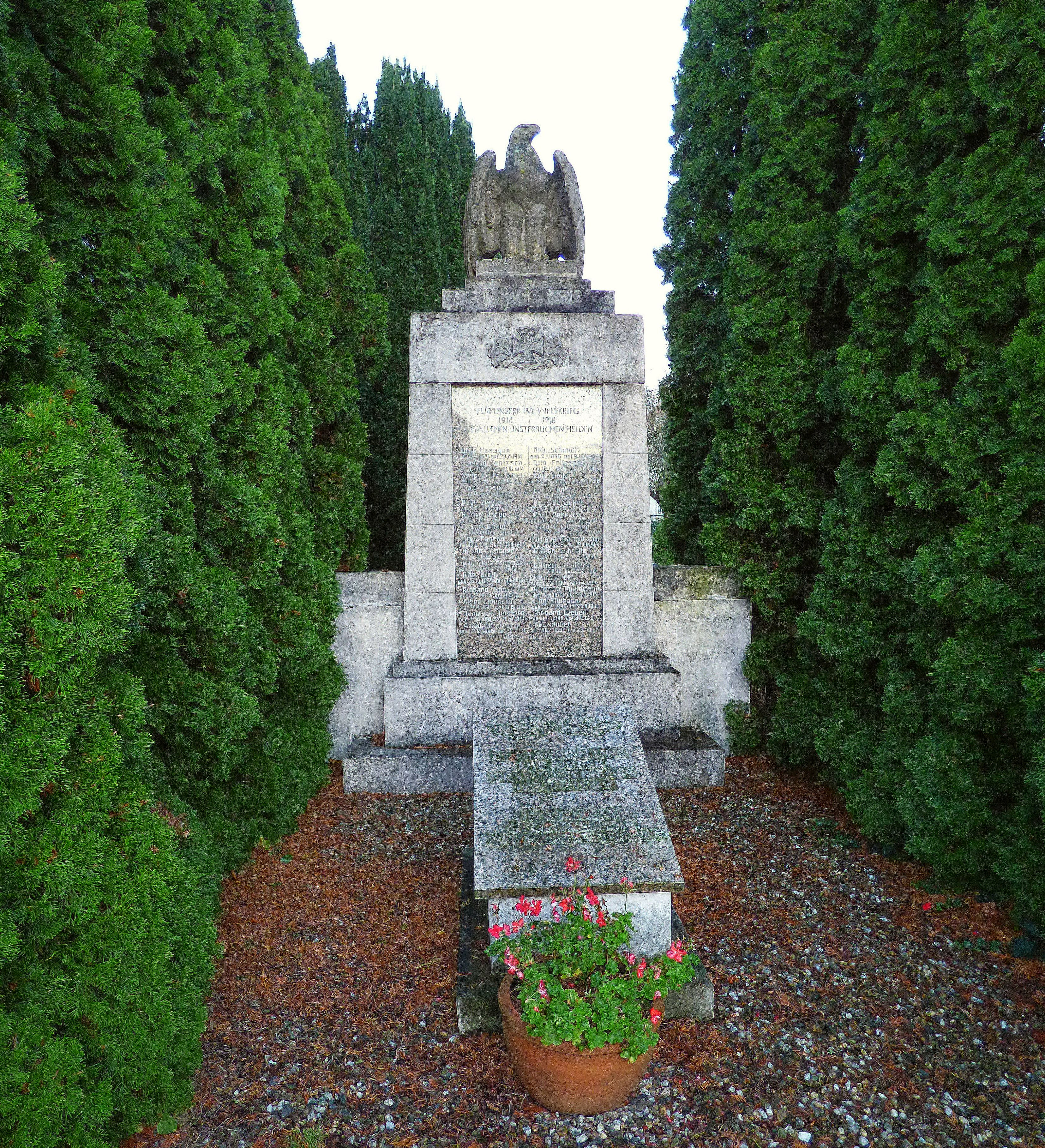 gefallenendenkmal an der Dorfkirche Fichtenberg (Mühlberg/Elbe)